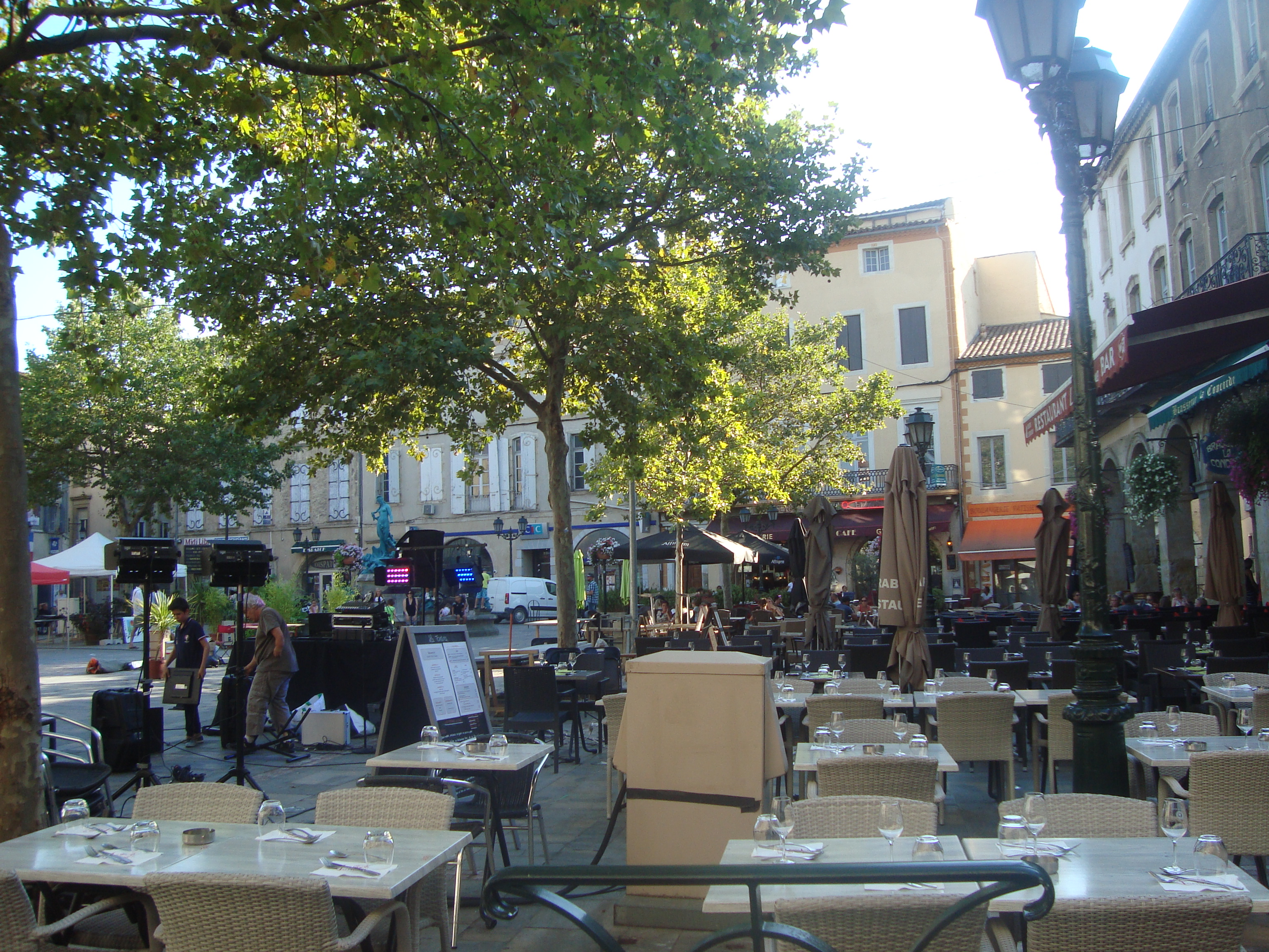 Plaza de la República, Limoux (Aude, Francia)